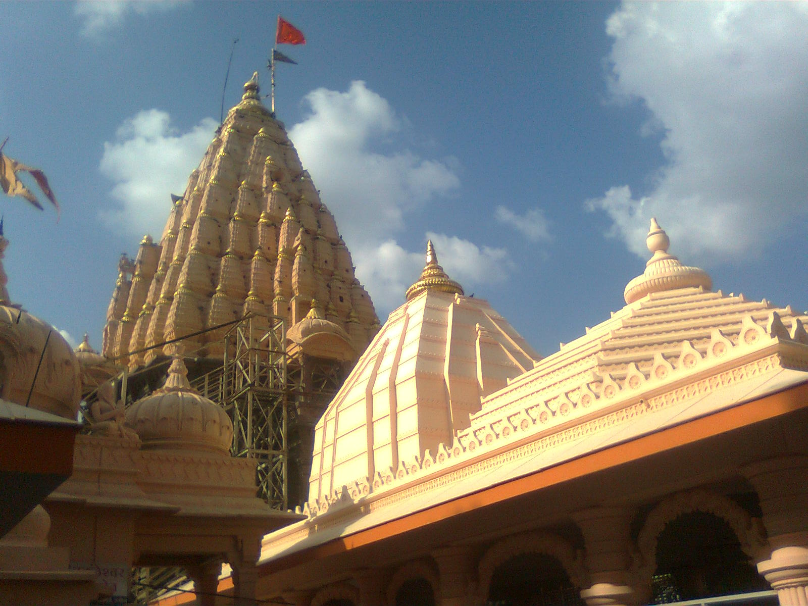 Shri Mahakaleshwar Temple Ujjain